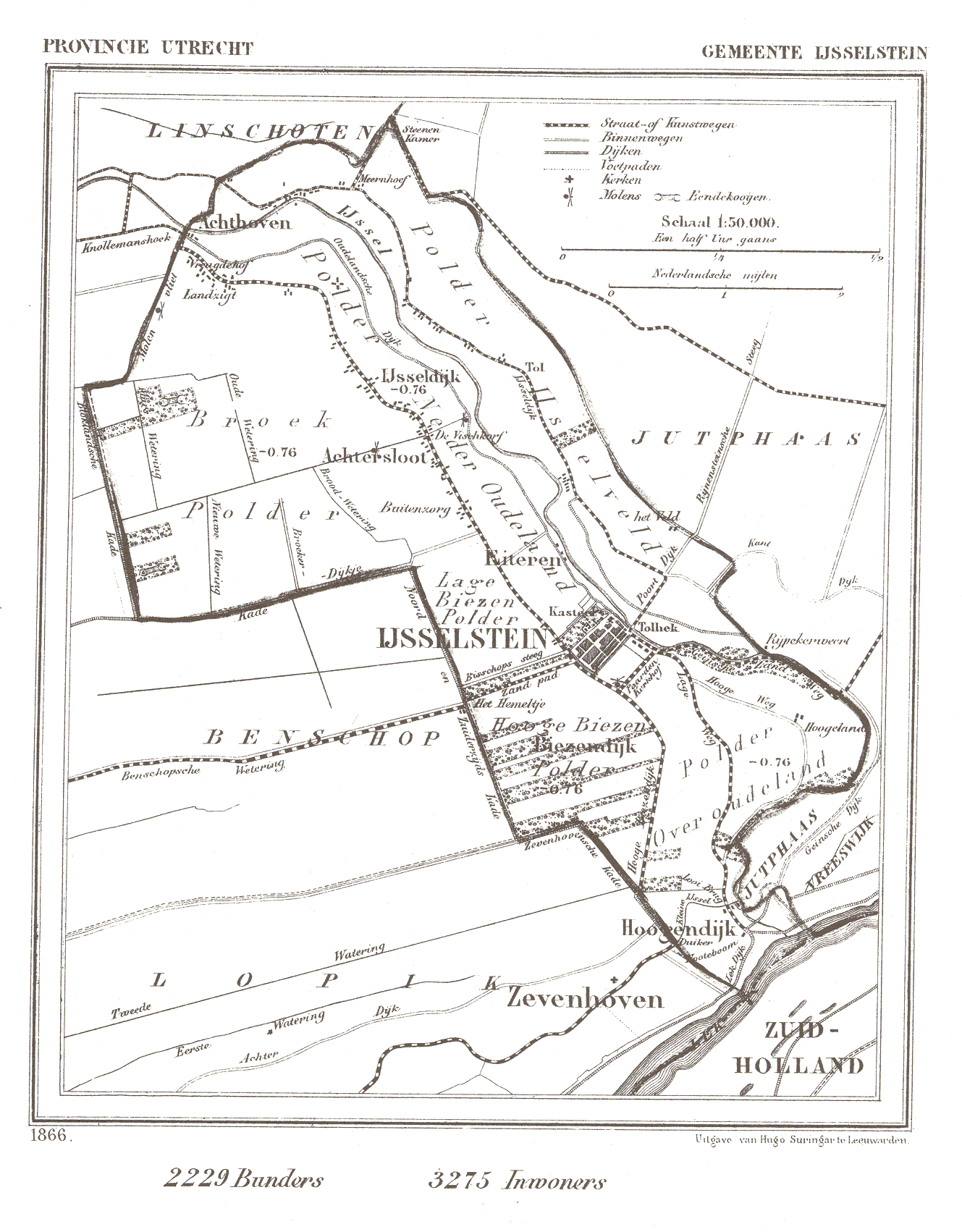 Kaart van IJsselstein uit Gemeente Atlas van Nederland, J. Kuyper 1865-1870, Uitgave Hugo Suringar Leeuwarden.